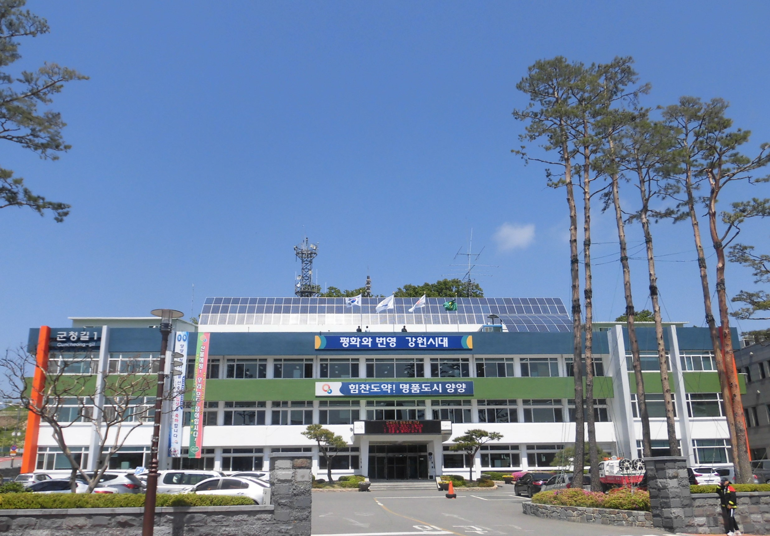 강원도 양양군에 있는 양양군청